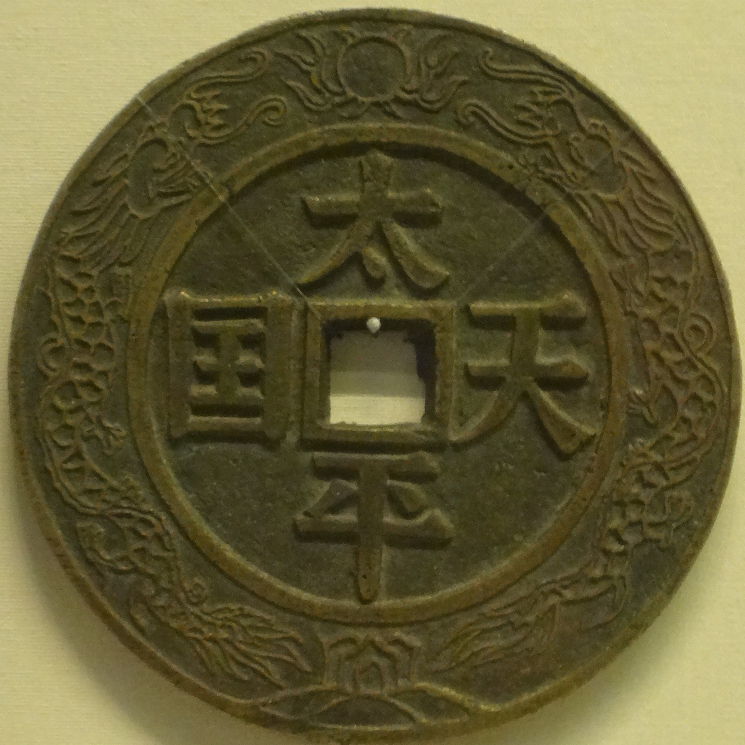 太平天国（背圣宝）镇库钱